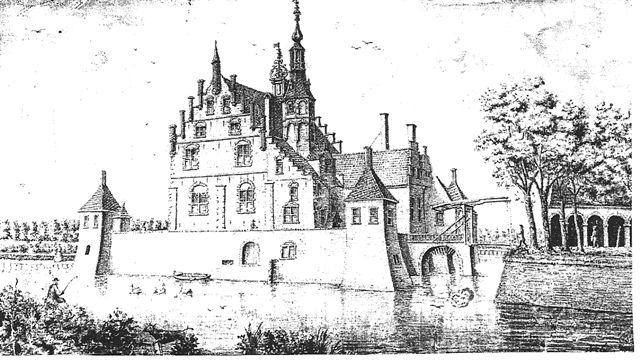 Martenastate afgebroken in 1879 Groot Terhorne 1736 door Nicolaas Ypeij